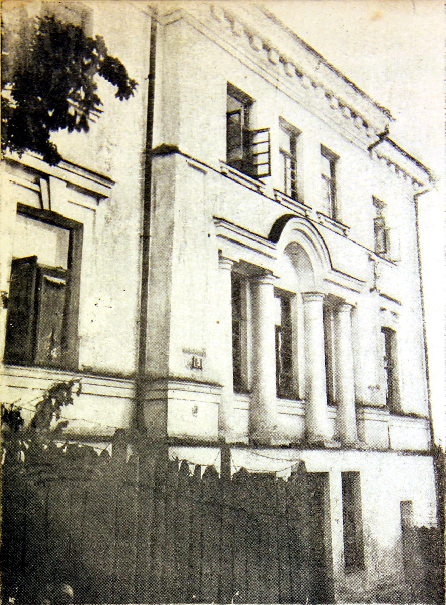 Беларуская (тарашкевіца): Менск (Miensk), завулак Музычны (zavułak Muzyčny). Дом масонаў